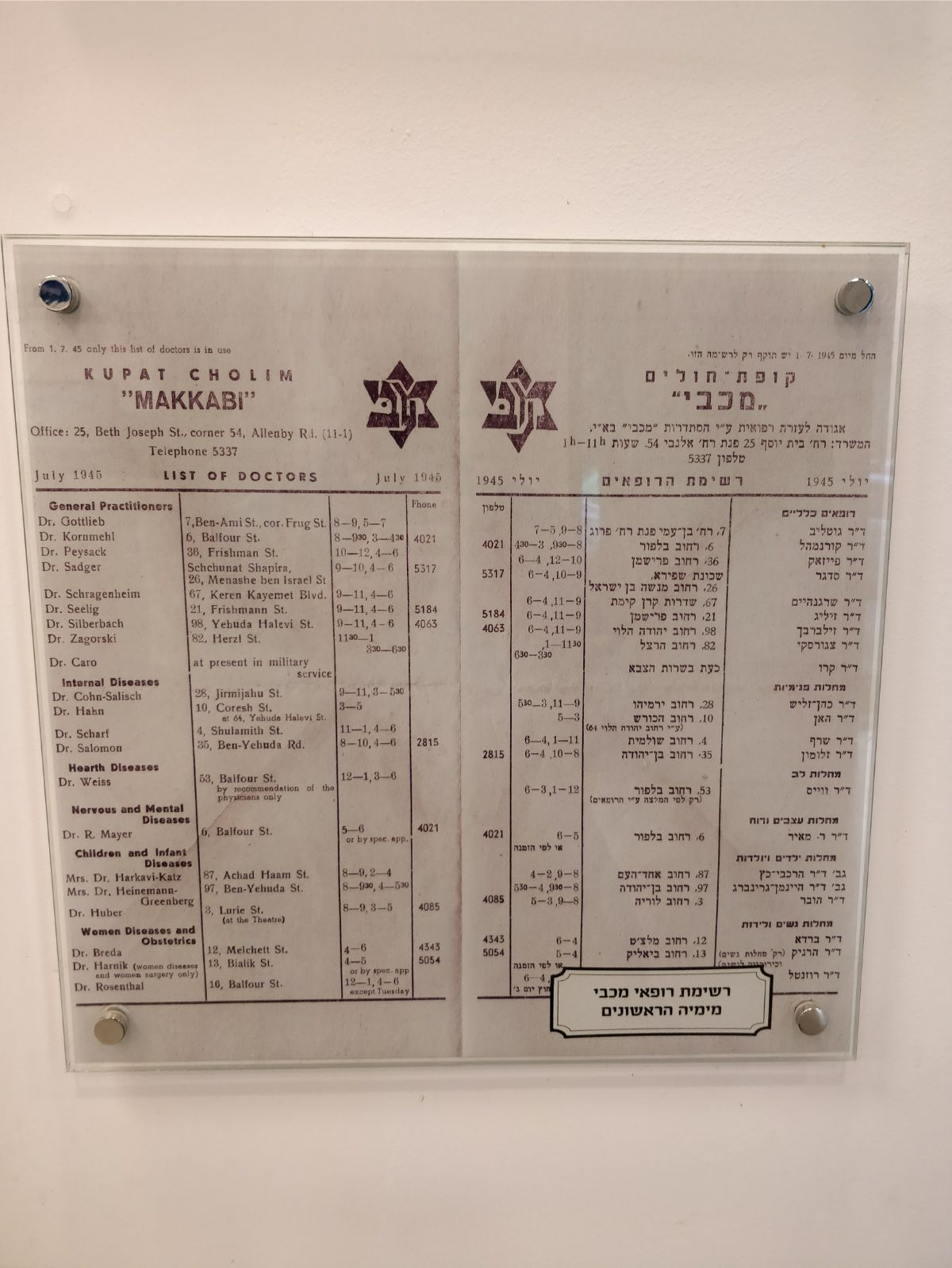 בית רופאים ראשון: קופת חולים מכבי